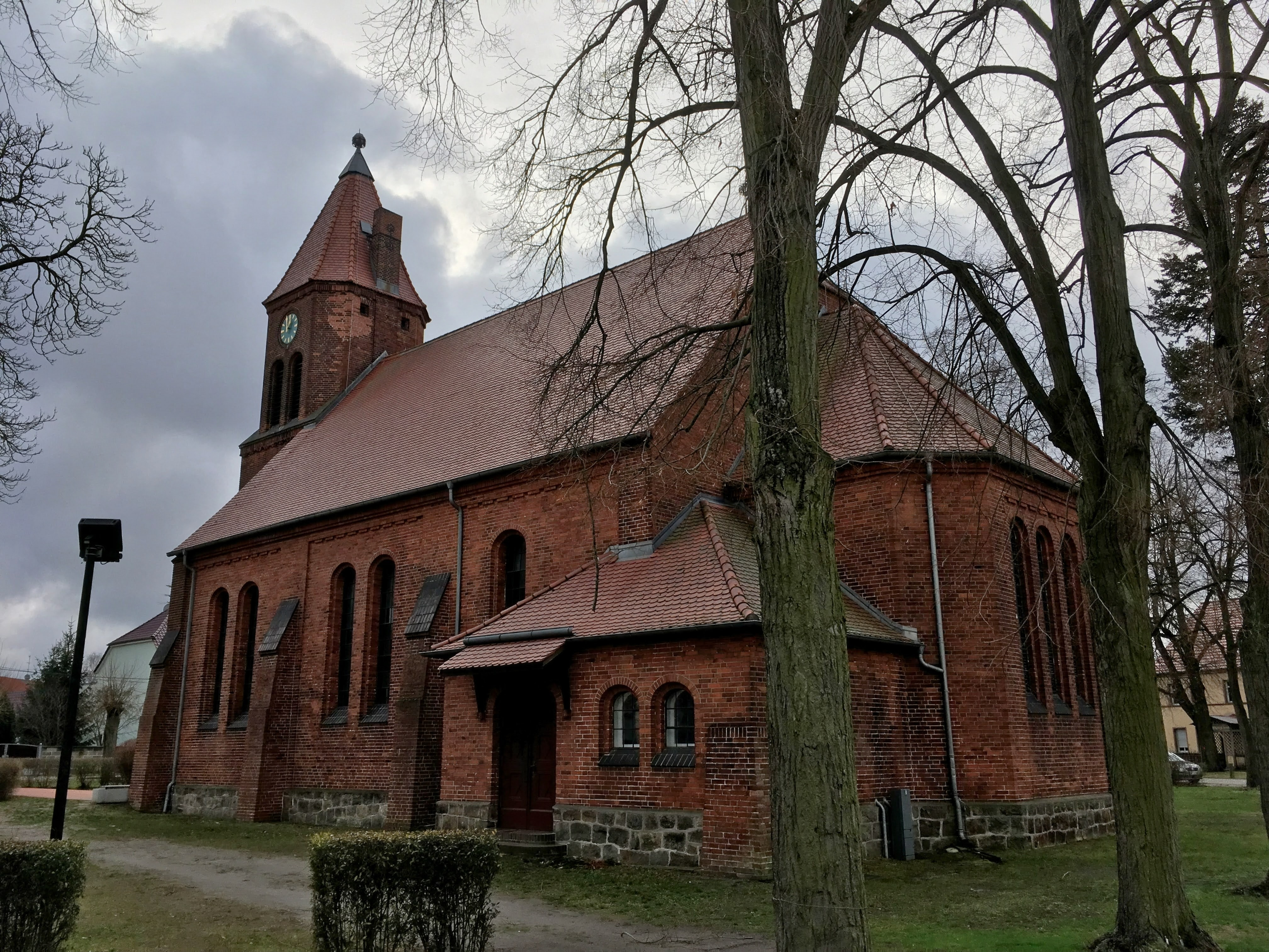 Die Dorfkirche Woltersdorf ist eine neugotische Kirche aus dem Jahr 1911 in Woltersdorf, einem Ortsteil der Gemeinde Nuthe-Urstromtal im Landkreis Teltow-Fläming im Land Brandenburg.